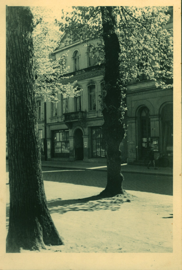 Atelier Innerer Damm, Oldenburg